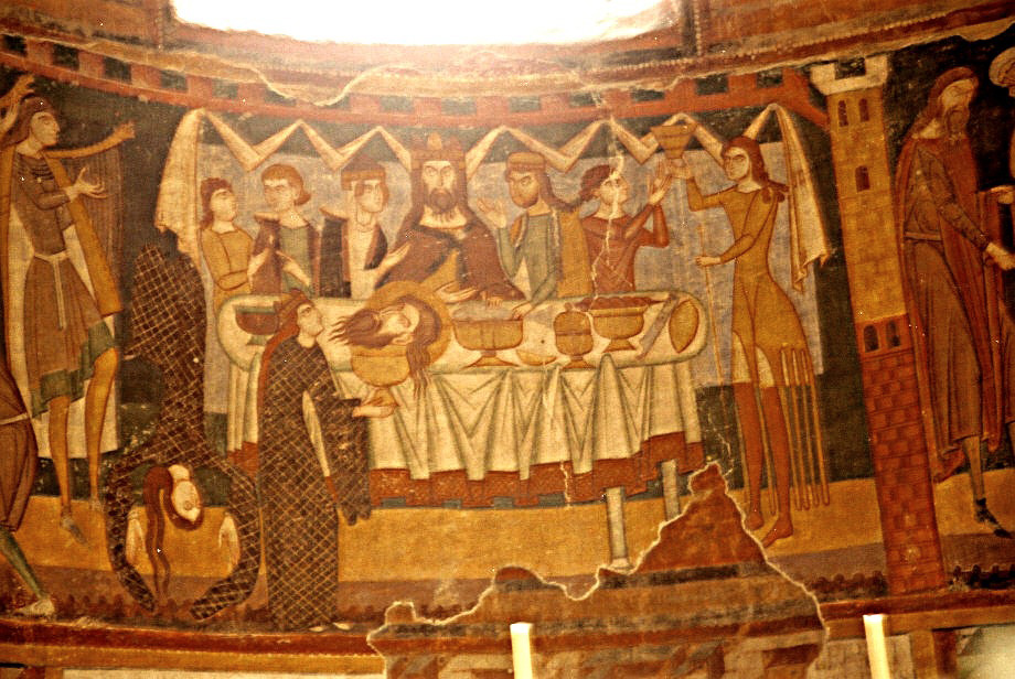 Benediktinerkloster St. Johann, Müstair